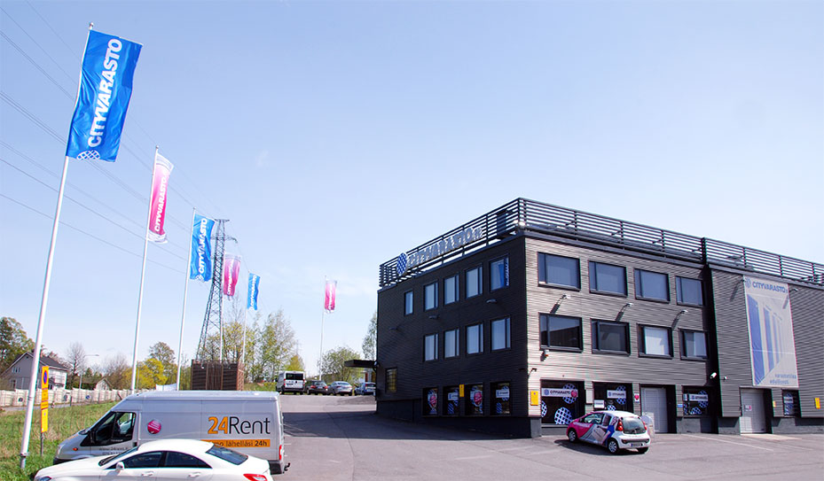 Cityvarasto Helsingin Metsälässä. Rakennuksessa vuokrataan pienvarastoja sekä myydään pakkaustarvikkeita.